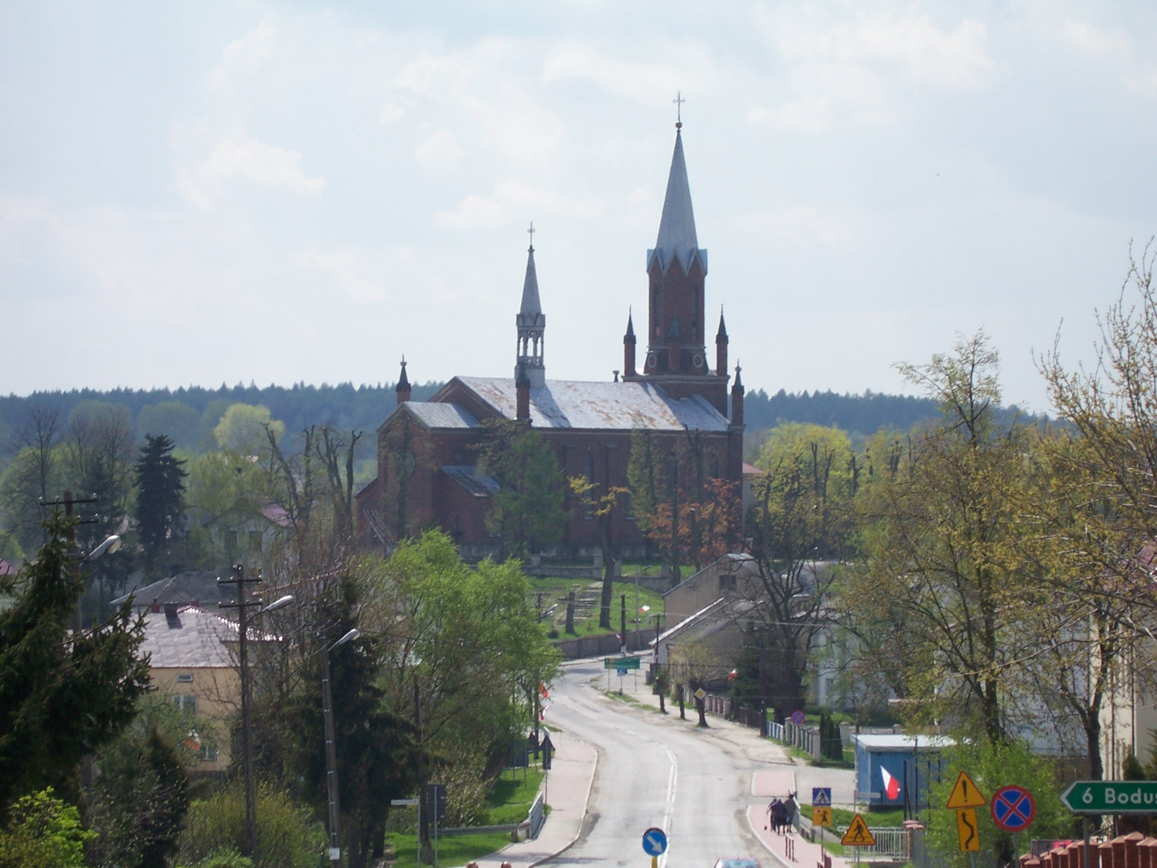 Iwaniska